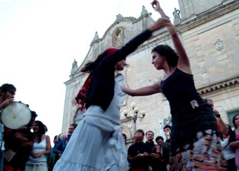 example of pizzica dance.